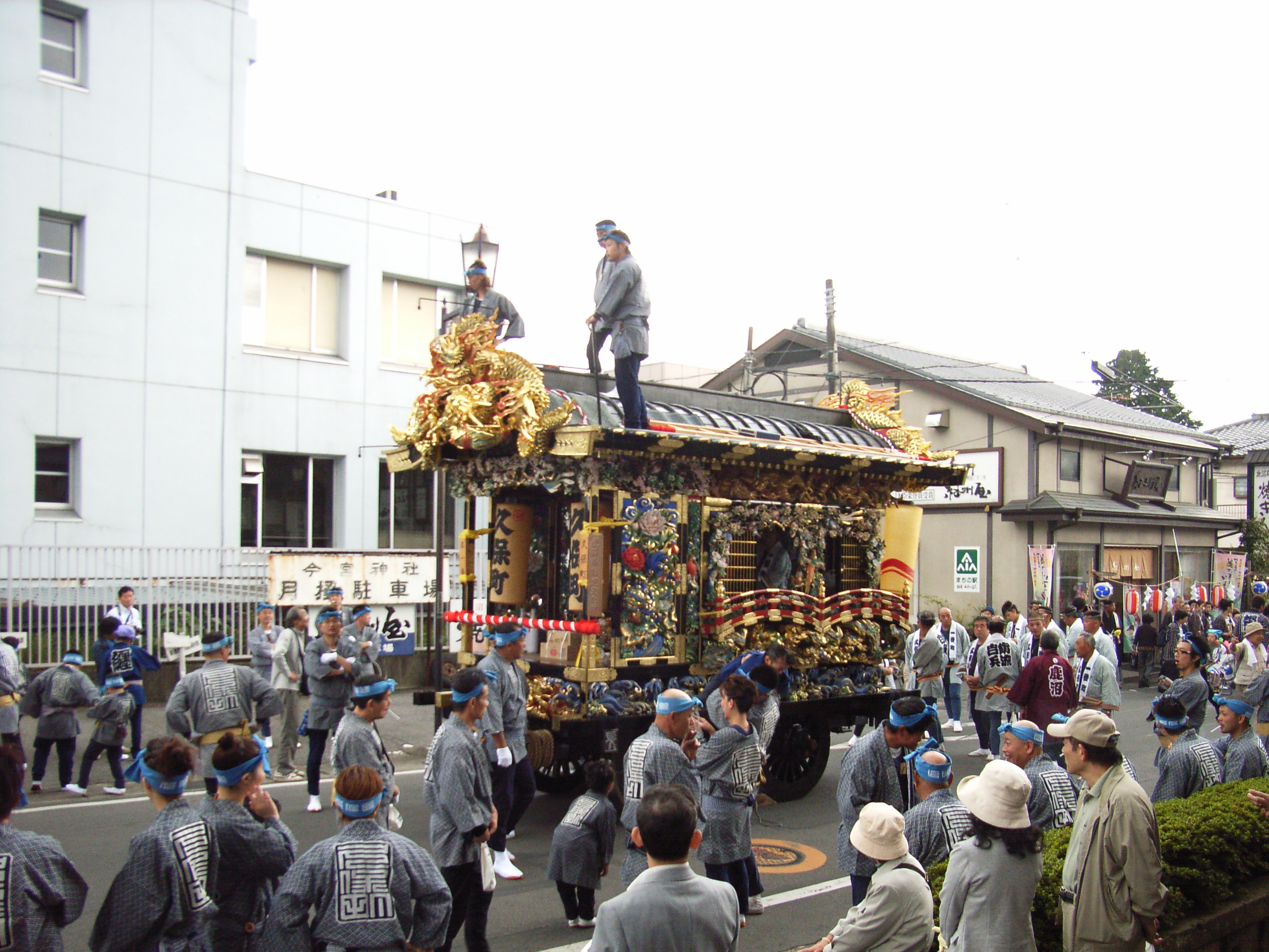 今宮神社参道の様子